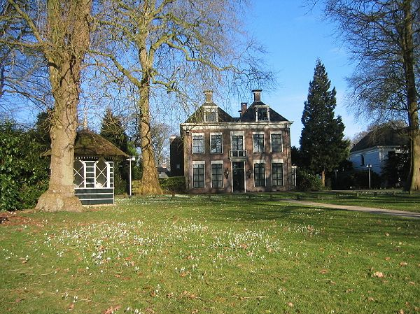 Lycklamahûs te Beetsterzwaag